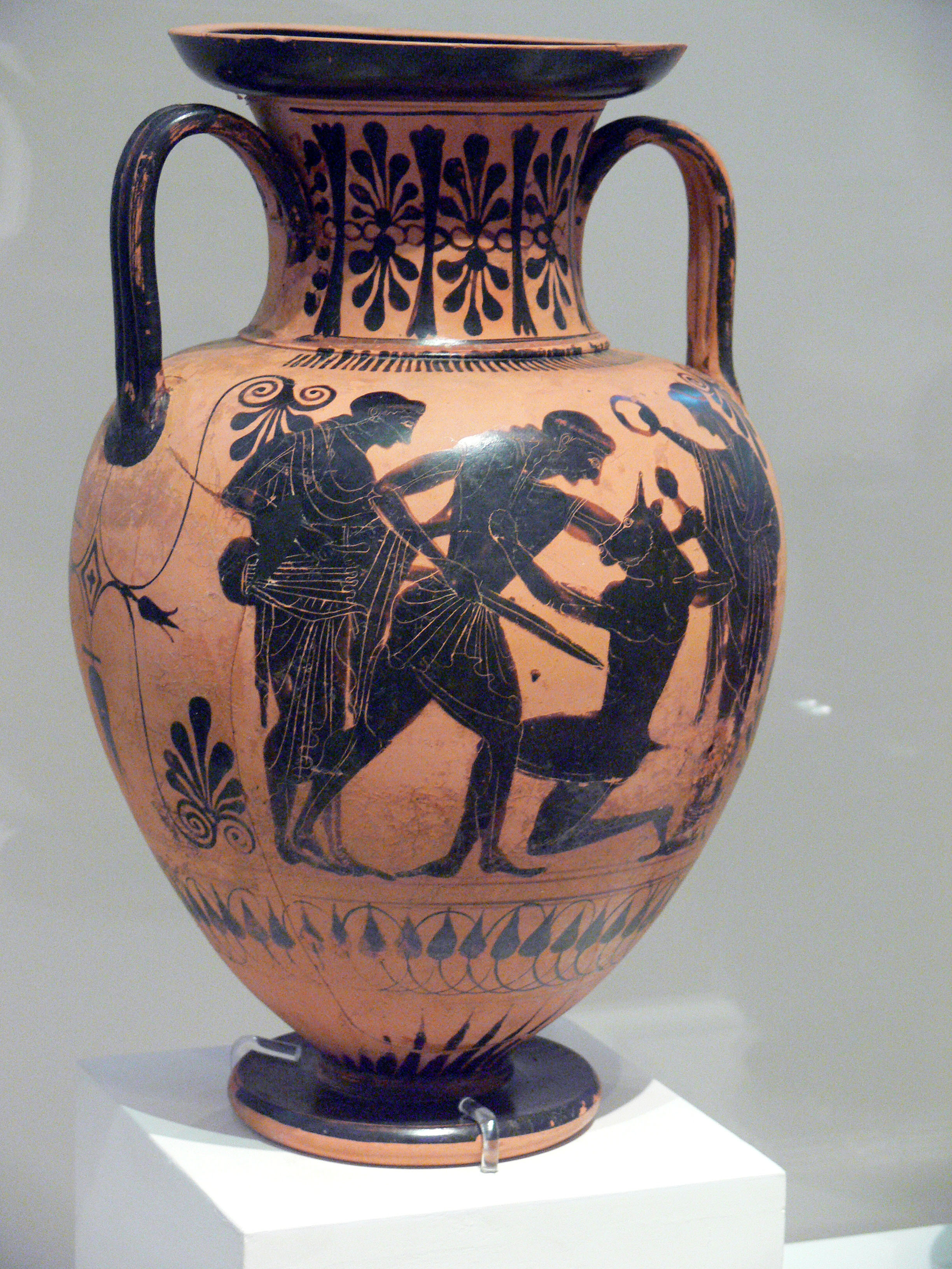 Tod des Minotaurus